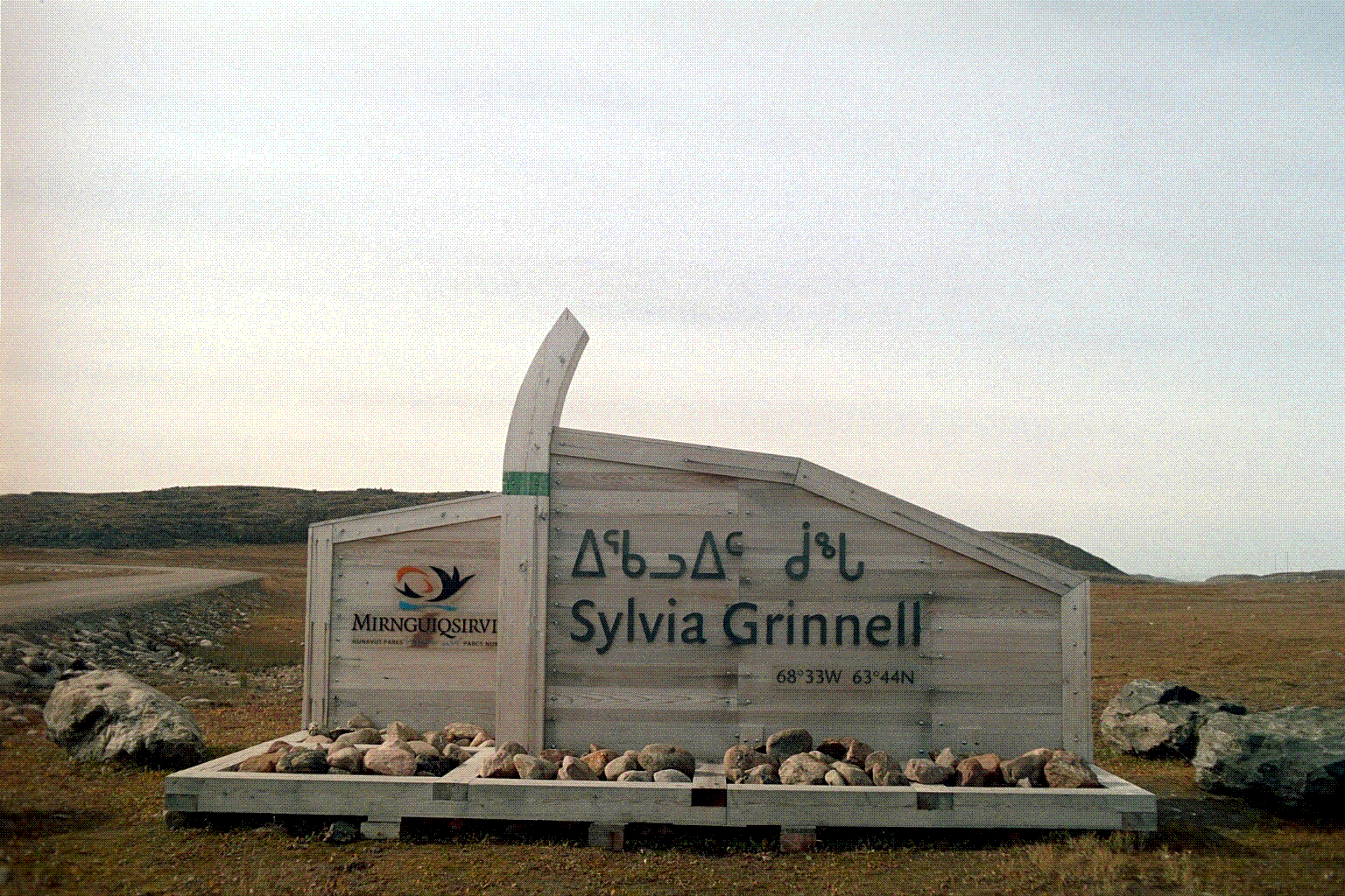 Eingang Park Silvia Grinnell Iqaluit